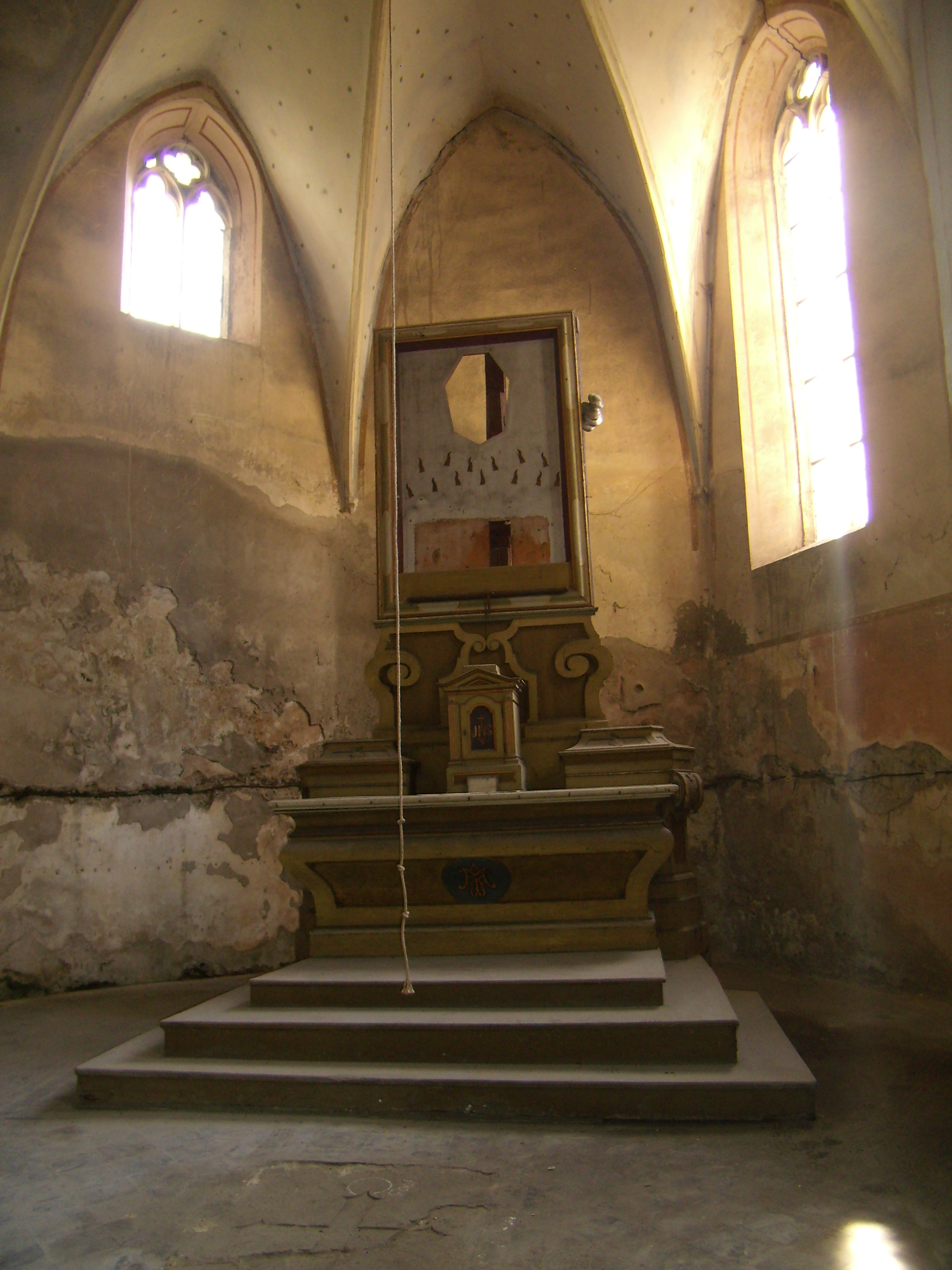 Kostel sv. Ducha (Krupka)-presbytář